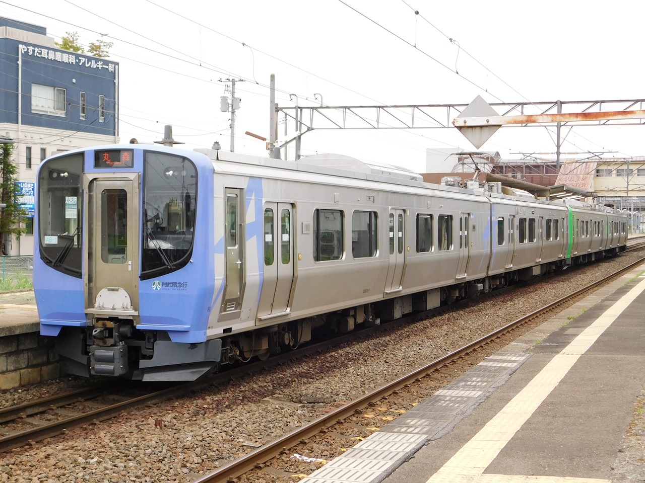 阿武隈急行 AB900系（AB-1,AB-2編成） Nikon Coolpix B500